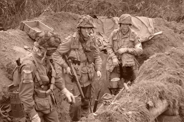 reconstitution de la 101eme airborne US juin 1944